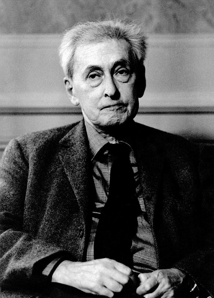 Ilya Ehrenburg